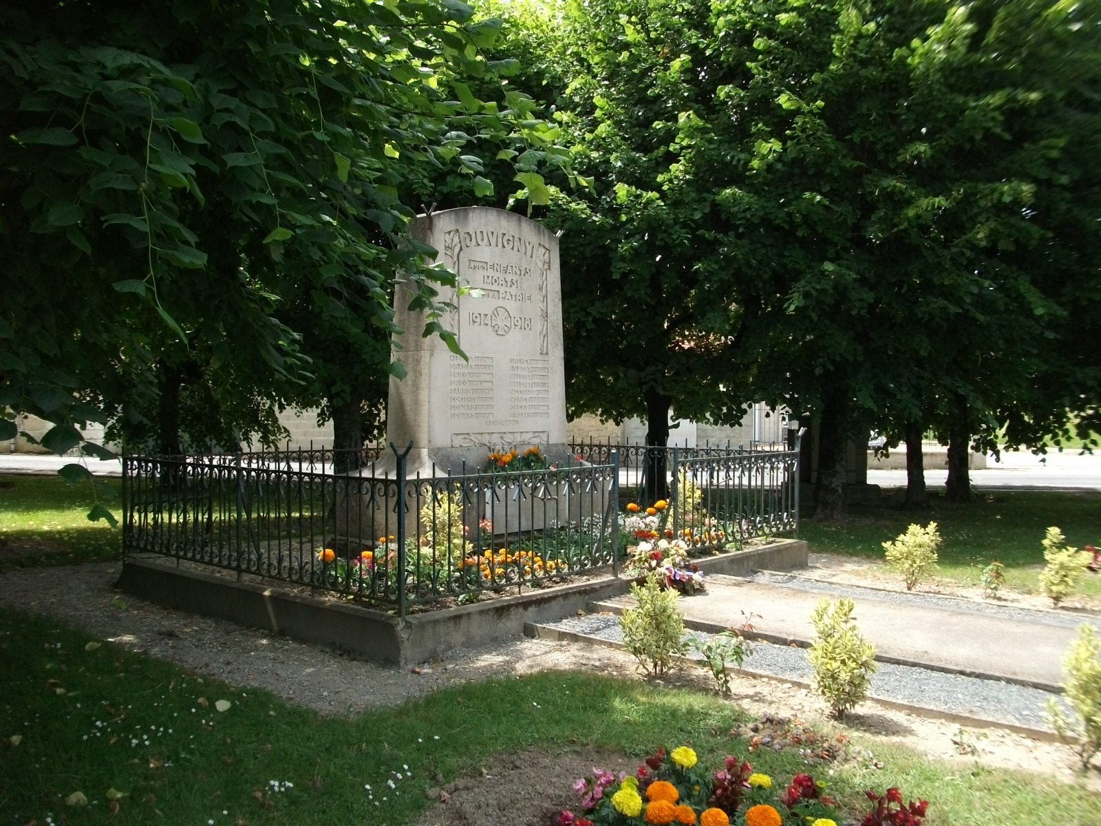 vue du monument aux mort de Juvigny.